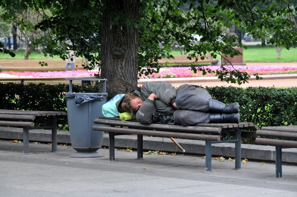 Gedimino Prospekt Vilnius